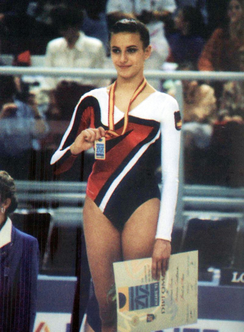 La gimnasta española Carmen Acedo con la medalla de oro en mazas en el Mundial de Alicante en 1993.